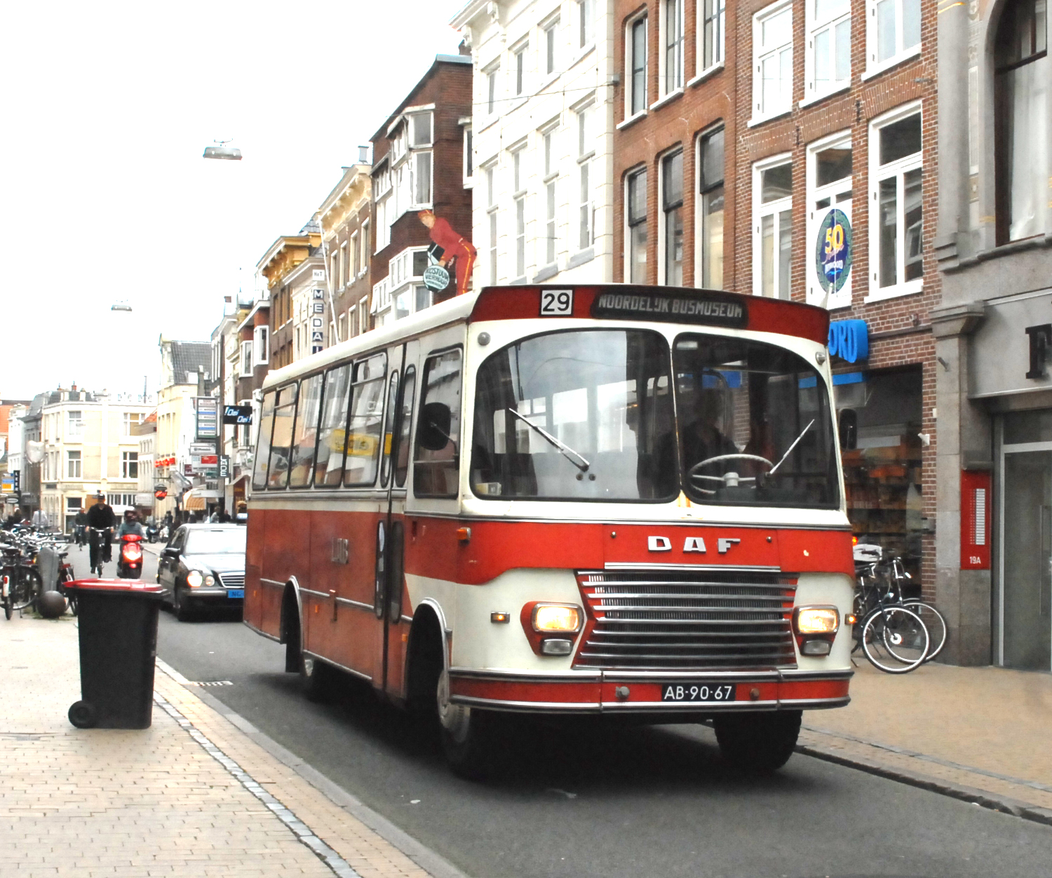 Leeuwarder Auto Bedrijf (LAB) bus 17 (later LABO/Fram: 608), Smit Joure / DAF B1300DD468 in de Oosterstraat te Groningen.